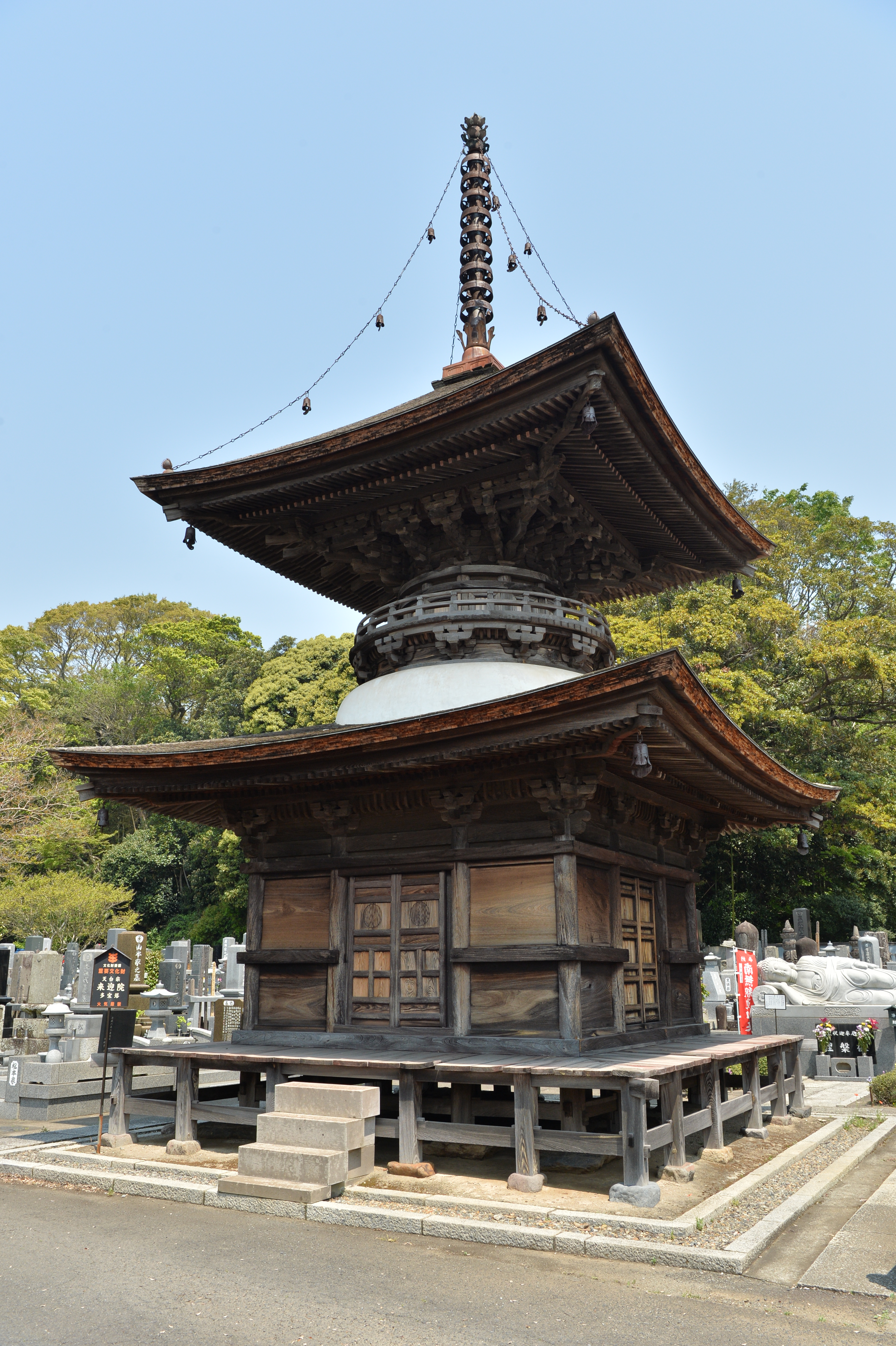 国指定重要文化財（平成18年12月19日指定）。多宝塔は室町時代後期の建物で、関東以北では現存する最古の塔だと言われている。